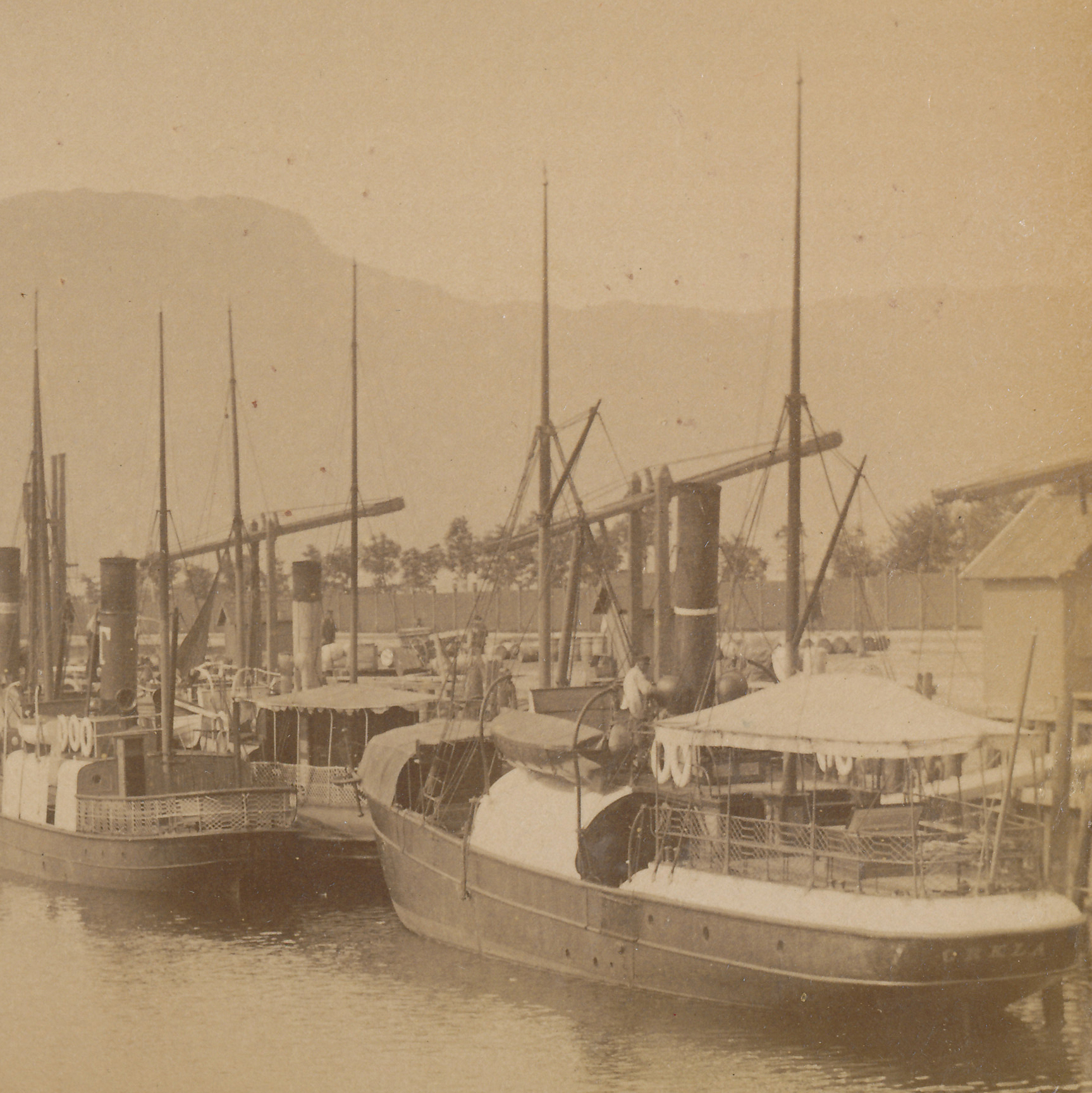 Format: Fotopositiv Dato / Date: 1893 Fotograf / Photographer: Jørgen Wickstrøm Sted / Place: Brattøra, Trondheim Lenke / Link: Se diskusjonen rundt de to fotografene Johan Erik Wickstrøm og Jørgen Johan Brock Wickstrøm (Preus Museum) Litteratur: Trondhjemske Samlinger: 1893 - et år i Trondhjem. Bilder av Jørgen Wickstrøm (Trondheim 2001) Eier / Owner Institution: Trondheim byarkiv, The Municipal Archives of Trondheim Arkivreferanse / Archive reference: Tor.H40.B24.F1667 [T0104] Fra Havna. Nærmest ligger D/S "Orkla". I midten ytterst, M. Thams & Co. sin båt "Bjørnen". Bak den ligger en Namsosbåt. Ytterst den lille isbryteren til havnevesenet.